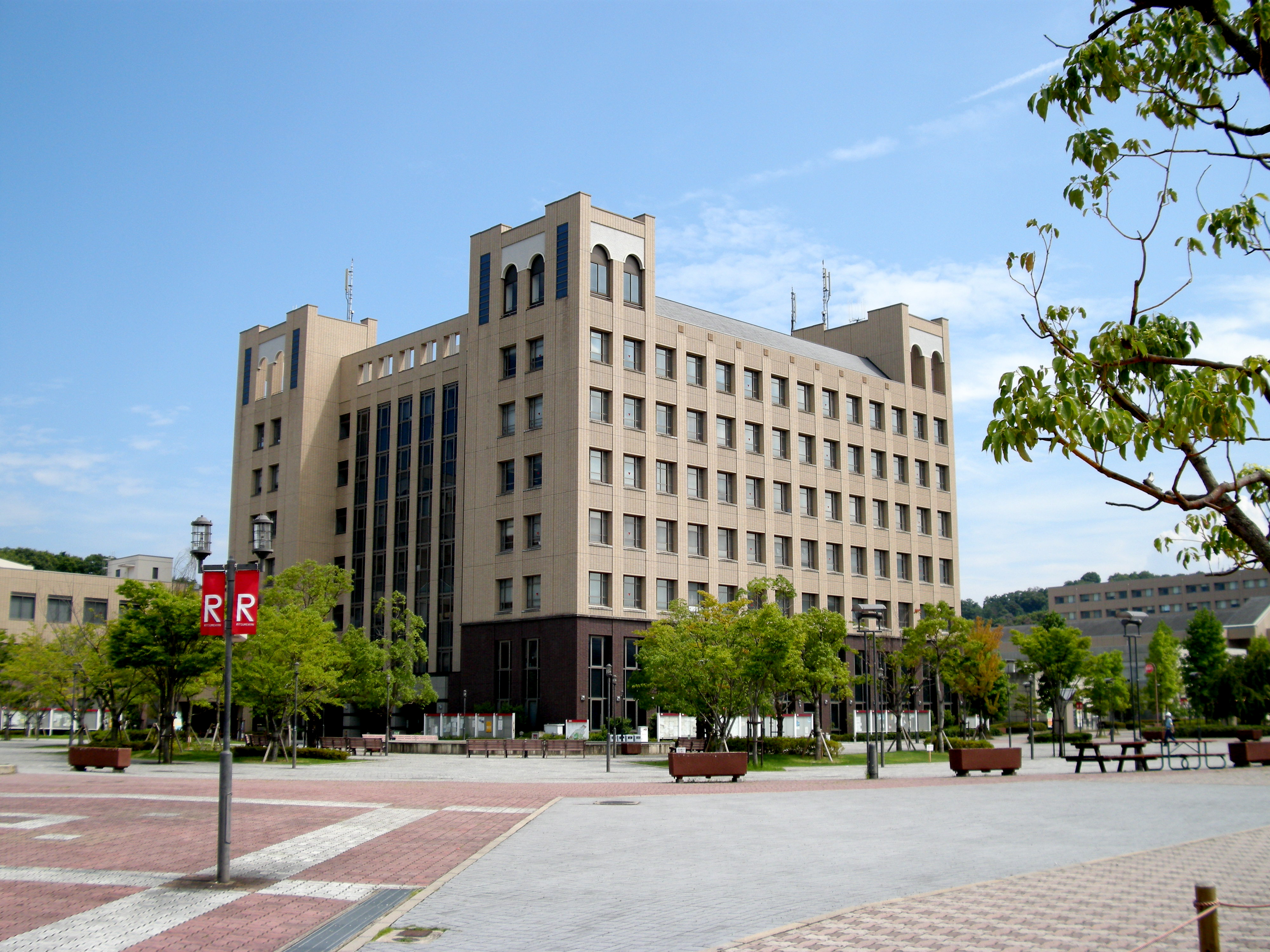 West Wing, (Biwako Kusatsu Campus, Ritsumeikan University, Japan)